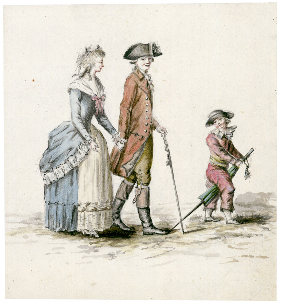 Der Sonntagsspaziergang. Junges Paar mit Knaben